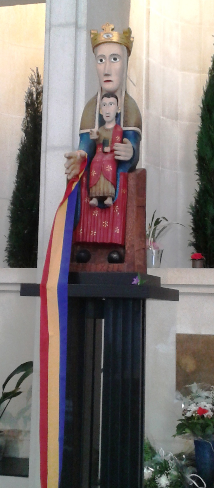 Mare de Déu de Meritxell